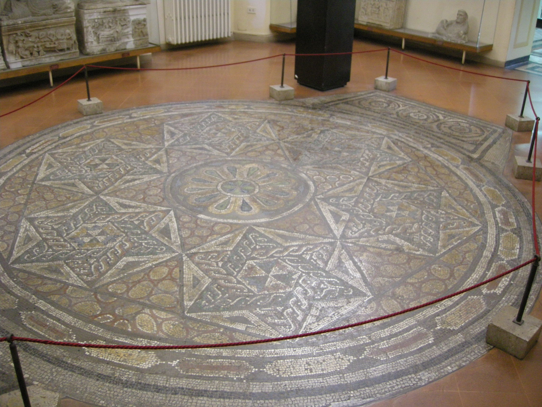 Museo guarnacci, Mosaico romano